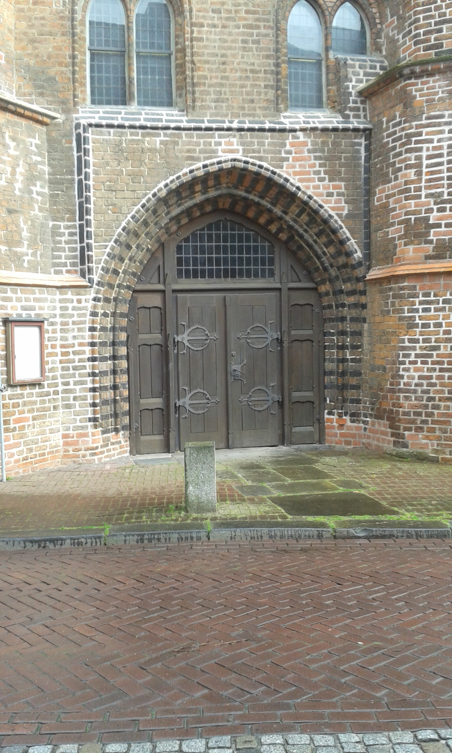 side door